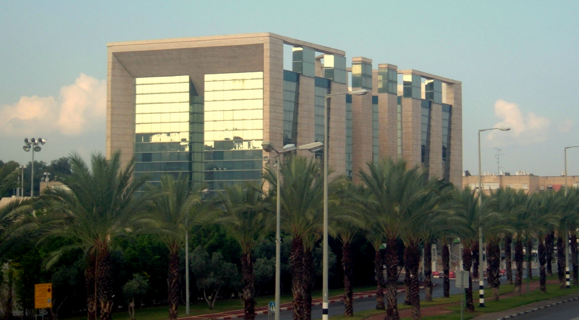 local court house in Kiryat Bialik, Israel מבנה בית משפט השלום בקרית ביאליק